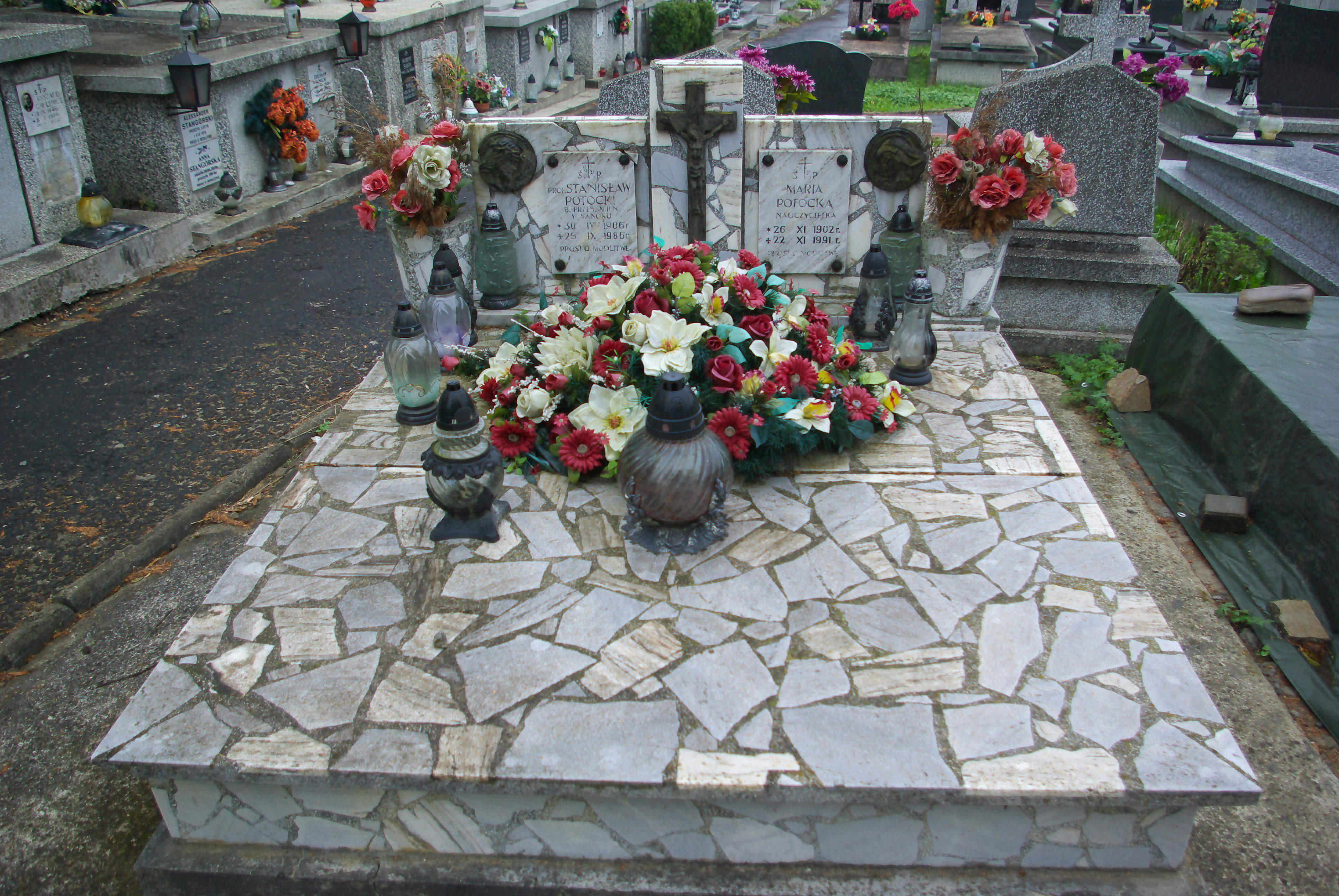 Grobowiec Marii i Stanisława Potockich na Cmentarzu Centralnym w Sanoku